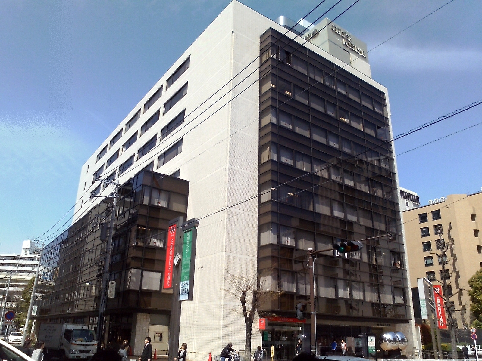 相鉄KSビル （横浜市西区）